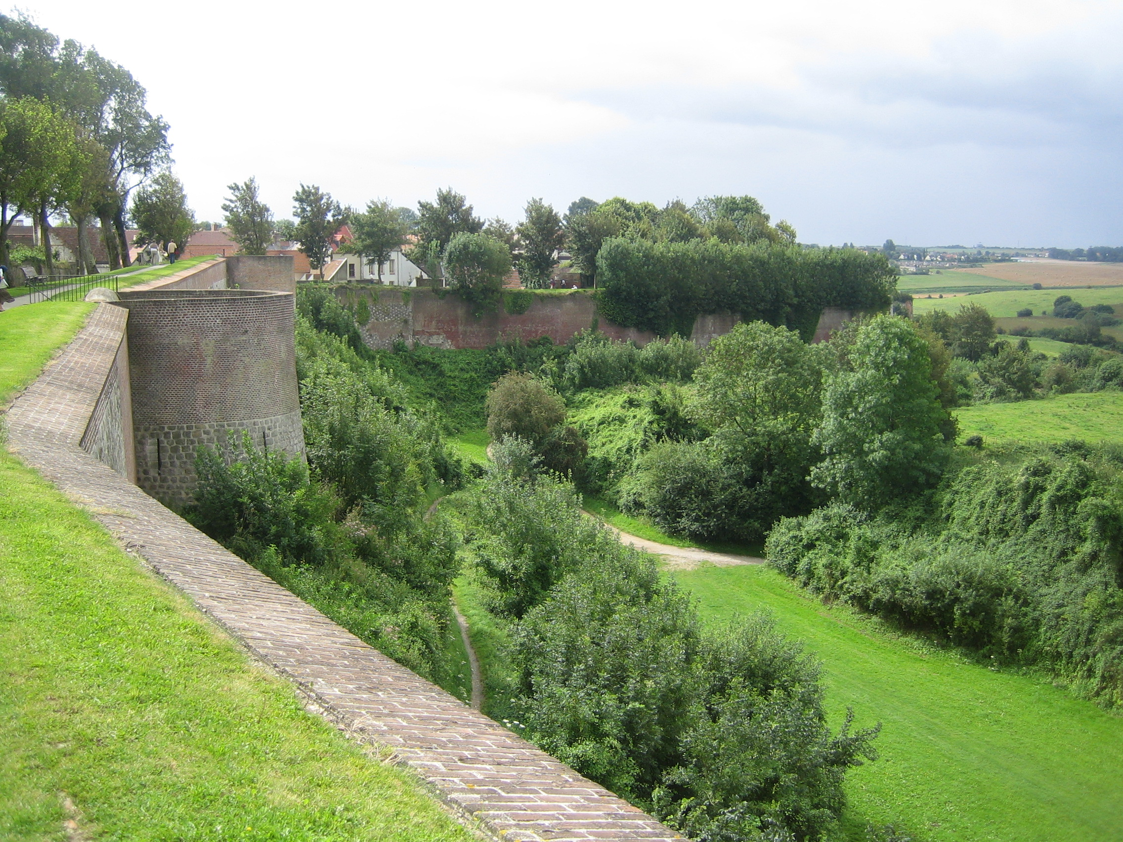 rempart de la ville de Montreuil-sur-Mer